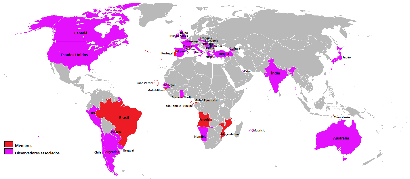 Países membros e observadores associados da CPLP